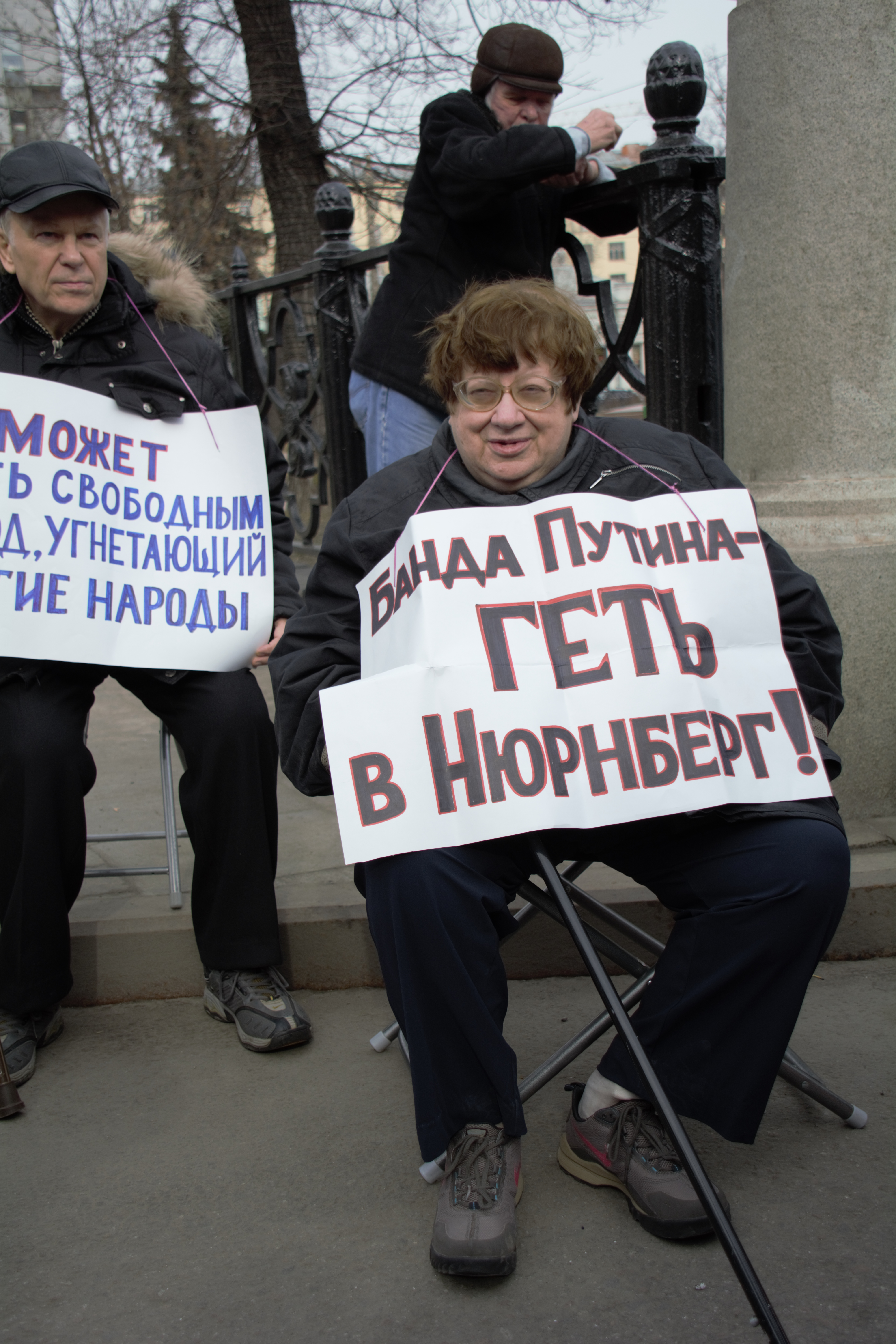 Валерия Новодворская: Банда Путина — геть в Нюрнберг!